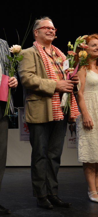 Per Fritzell på Oscarsteatern 28 november 2013.